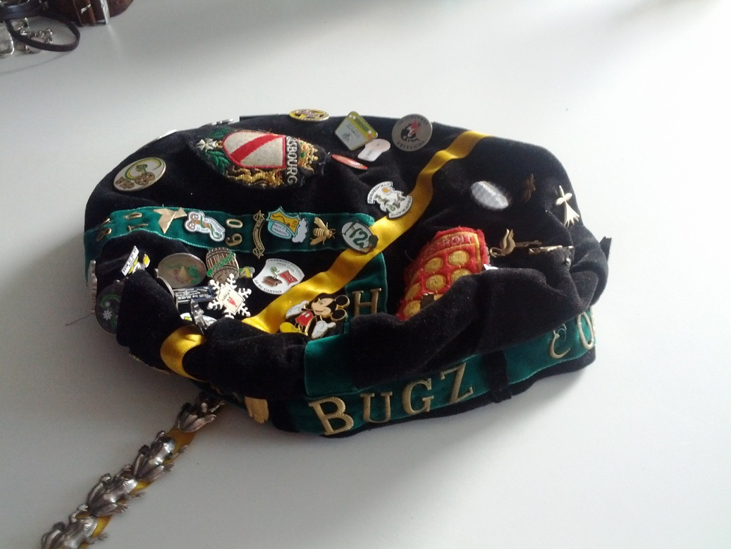 Faluche alsacienne